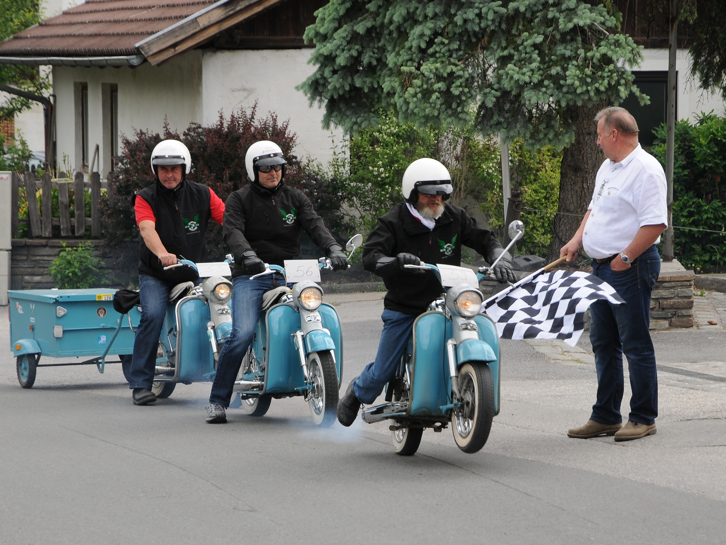 Die Puch DS 50 oder Puch DS 50 N ist ein Moped und Motorroller mit 48,8 cm³ Hubraum und 1,0 bis 1,7 kW Leistung, welches von 1959 bis 1981 vom österreichischen Hersteller Steyr-Daimler-Puch hergestellt wurde. DS steht für Doppelsitzer-Schalenrahmen, die Zahl 50 steht für den Hubraum von ca. 50 cm³. *** Mitglieder des Puch DS 50 Club Zillertal am Start in Weer. Puch DS 50 Club Zillertal